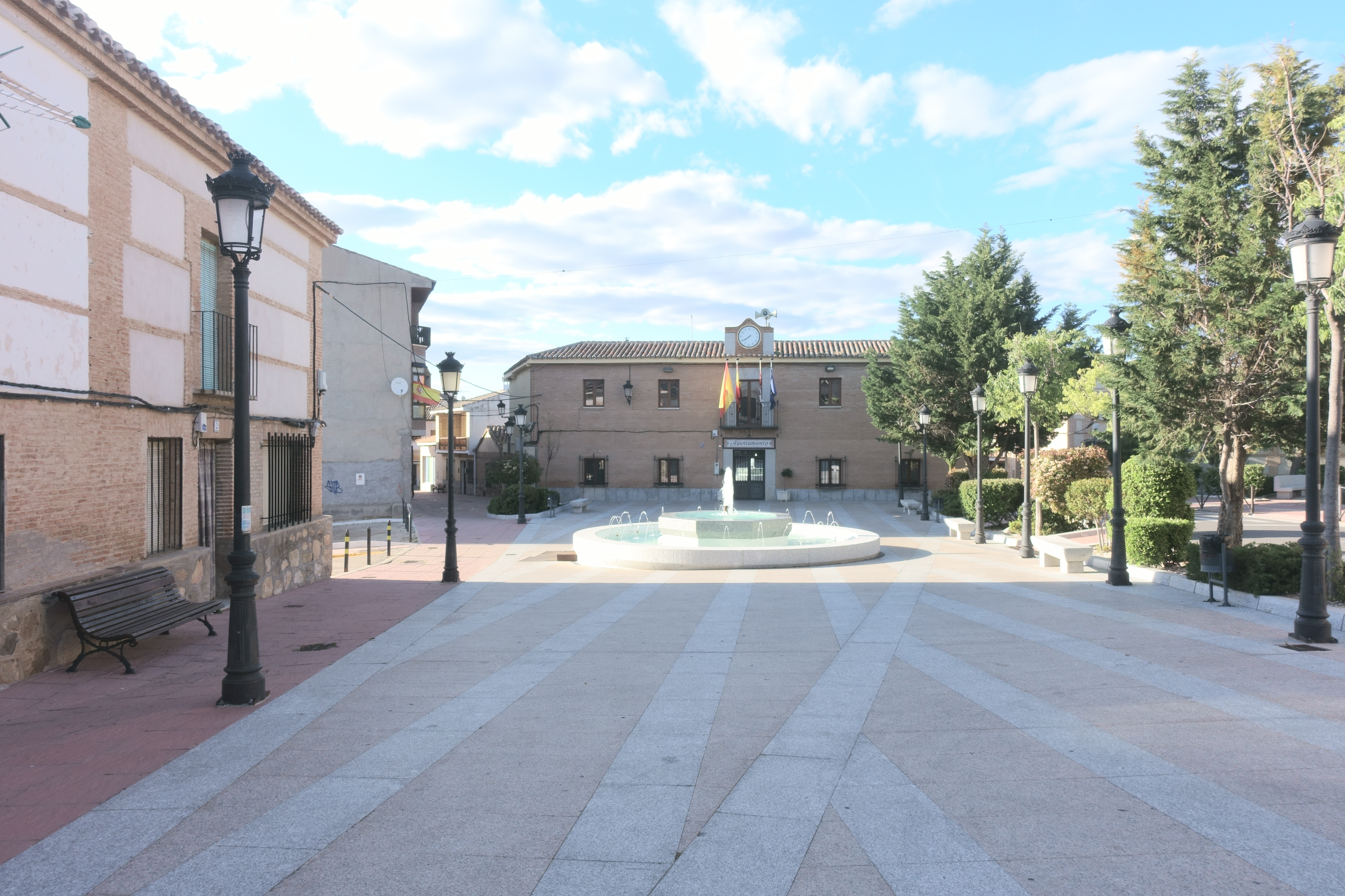 Plaza de la Concordia en Cobisa (Toledo, España).